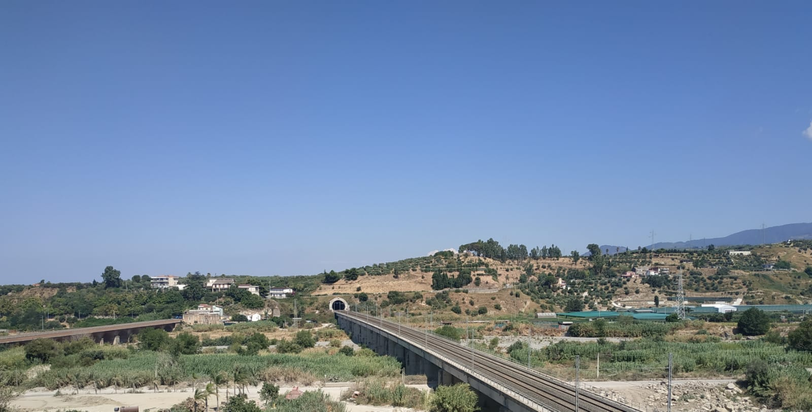 Ferrovia Messina Palermo nei pressi di Terme Vigliatore ( Viadotto sul torrente Mazzarrà tra le gallerie "San Biagio 1" e "Dambona"